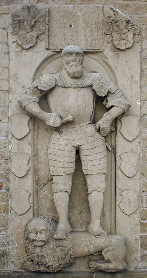 Epitaph Ludwig von Neipperg (†25. Dezember 1570) in Eppingen-Adelshofen, Beschreibung siehe: Edmund Kiehnle: Die Kirche zu Adelshofen. In: Kraichgau. Beiträge zur Landschafts- und Heimatforschung, Folge 10, 1987, S. 208